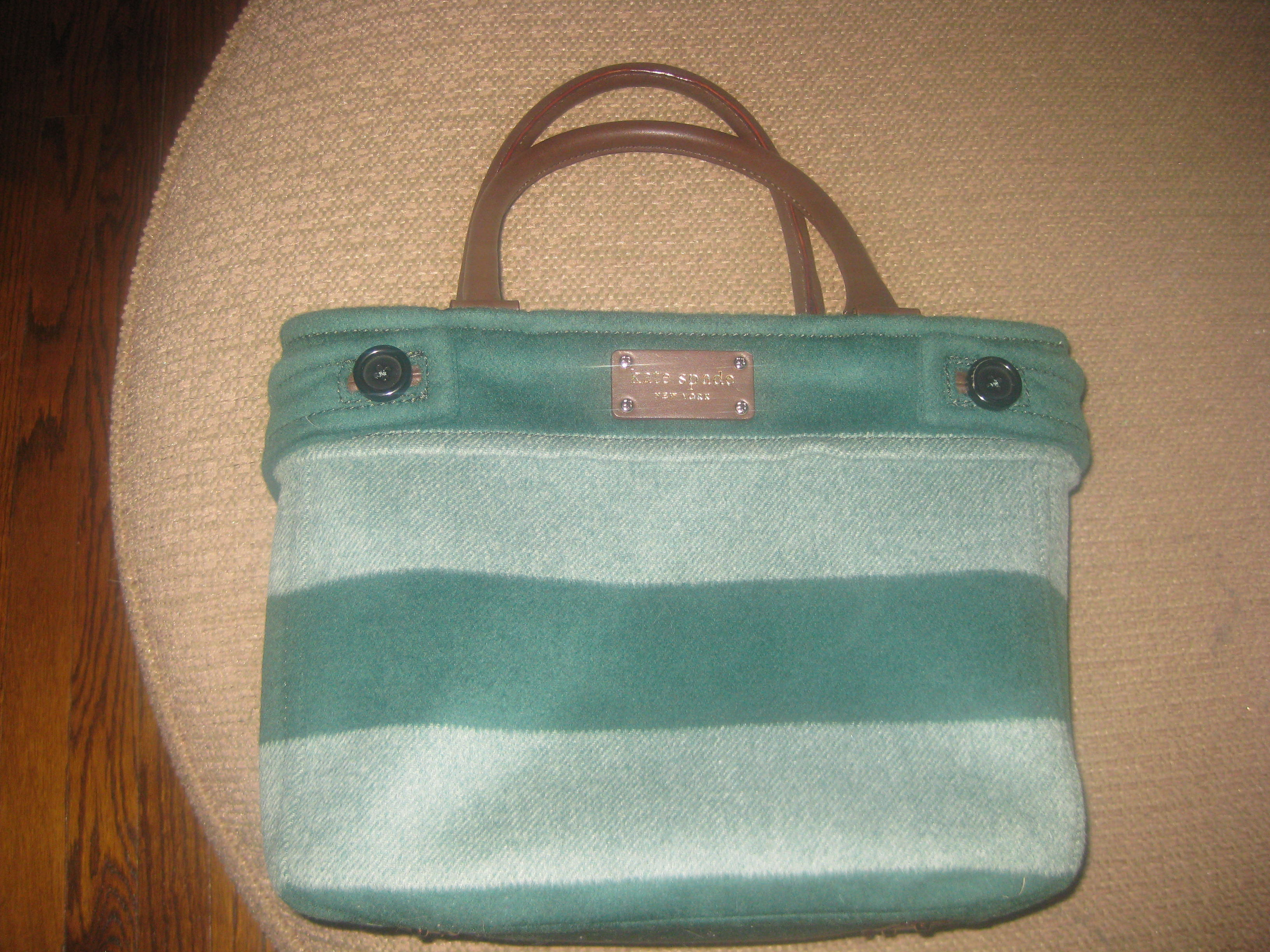 A Kate Spade handbag